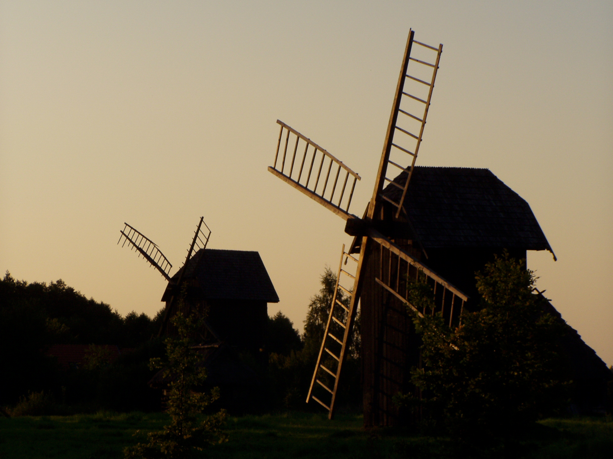 Wiatraki ze Skansenu w Białowieży (16.09.2006, autorka zdjęcia: Anna Aleksiejuk)